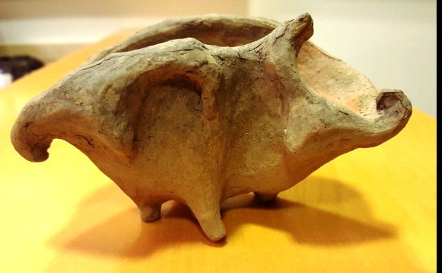 עבודת חרס של איקה קומפורטי